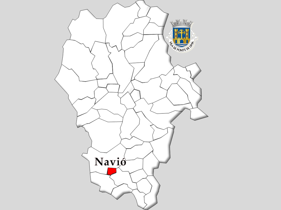 Cenos 1864/2011